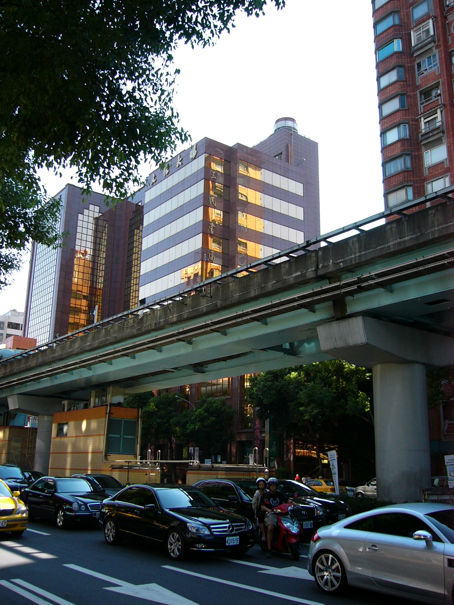 文化大樓，為三民書局總部及復北門市所在地，地址：臺北市中山區復興北路386號。前方是臺北捷運內湖線。